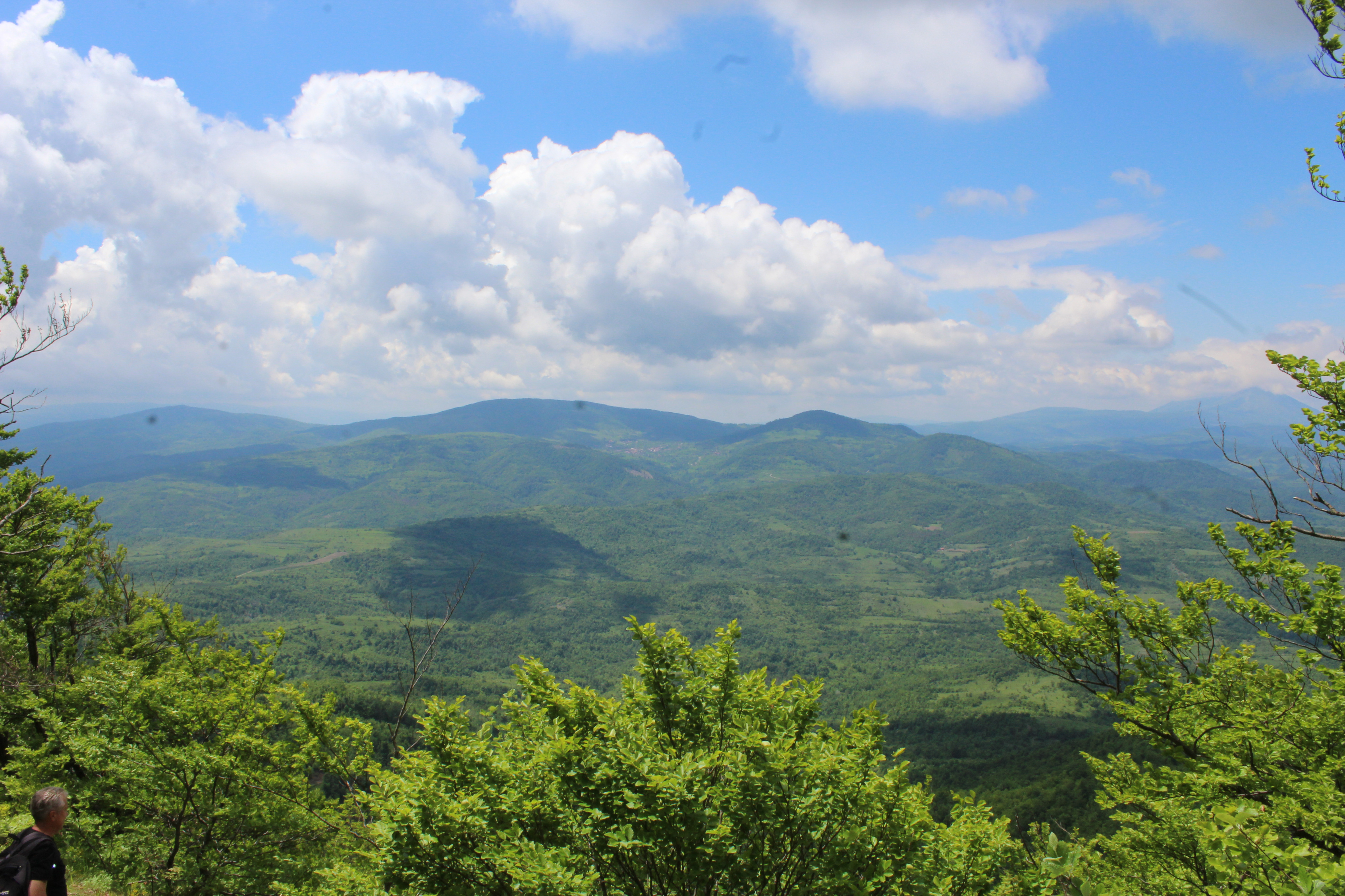 Srpski (latinica): Pogled na Slemen sa planine Tupižnice.